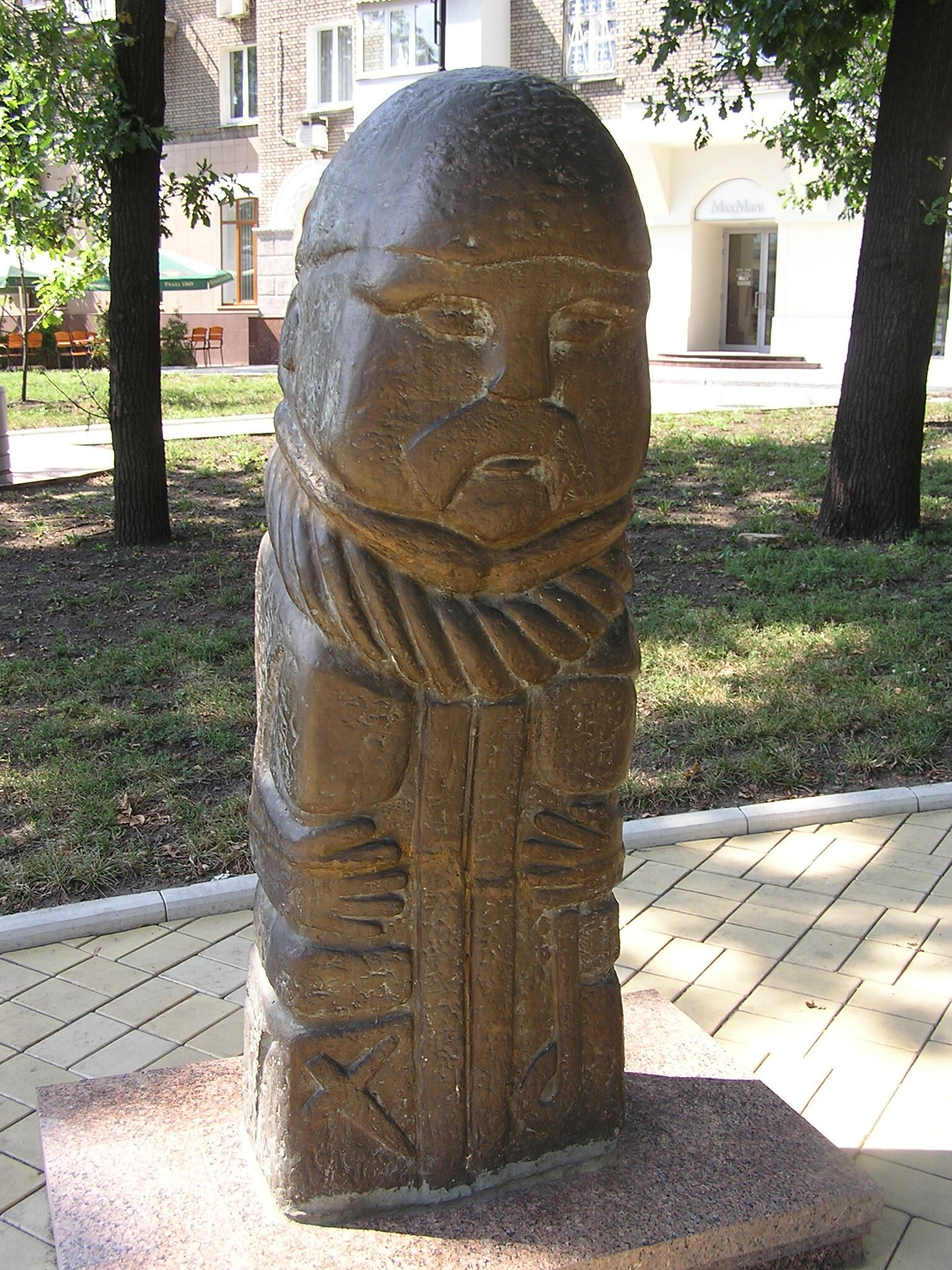 Донецк. Скифская композиция на Театральной площади. Копия скульптуры скифского воина в полном боевом облачении VI в. до н. э. найденой в селе Ольховчин Шахтёрского района Донецкой области.